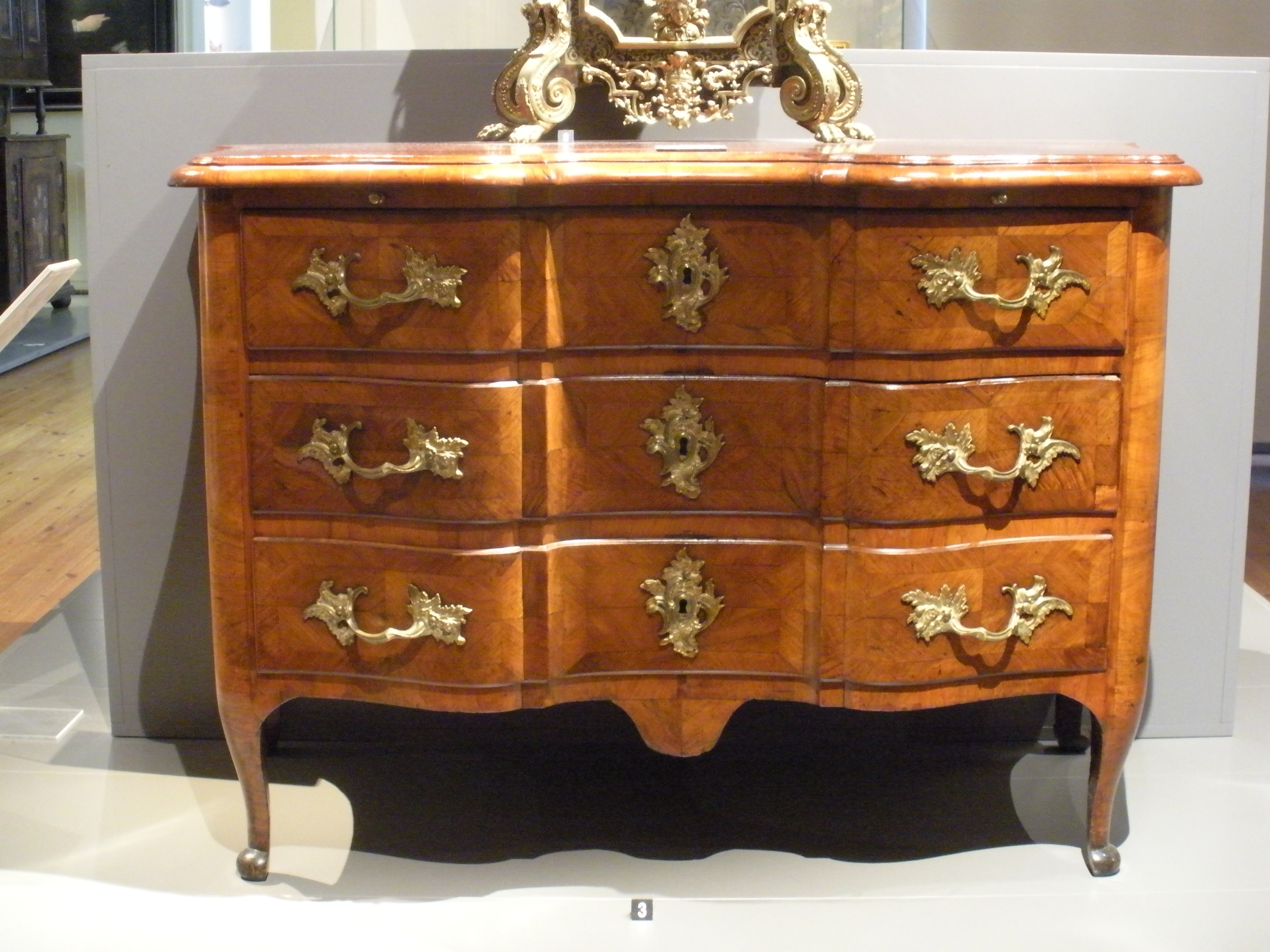 Rokokobyrå av Christian Linning i Finlands nationalmuseum